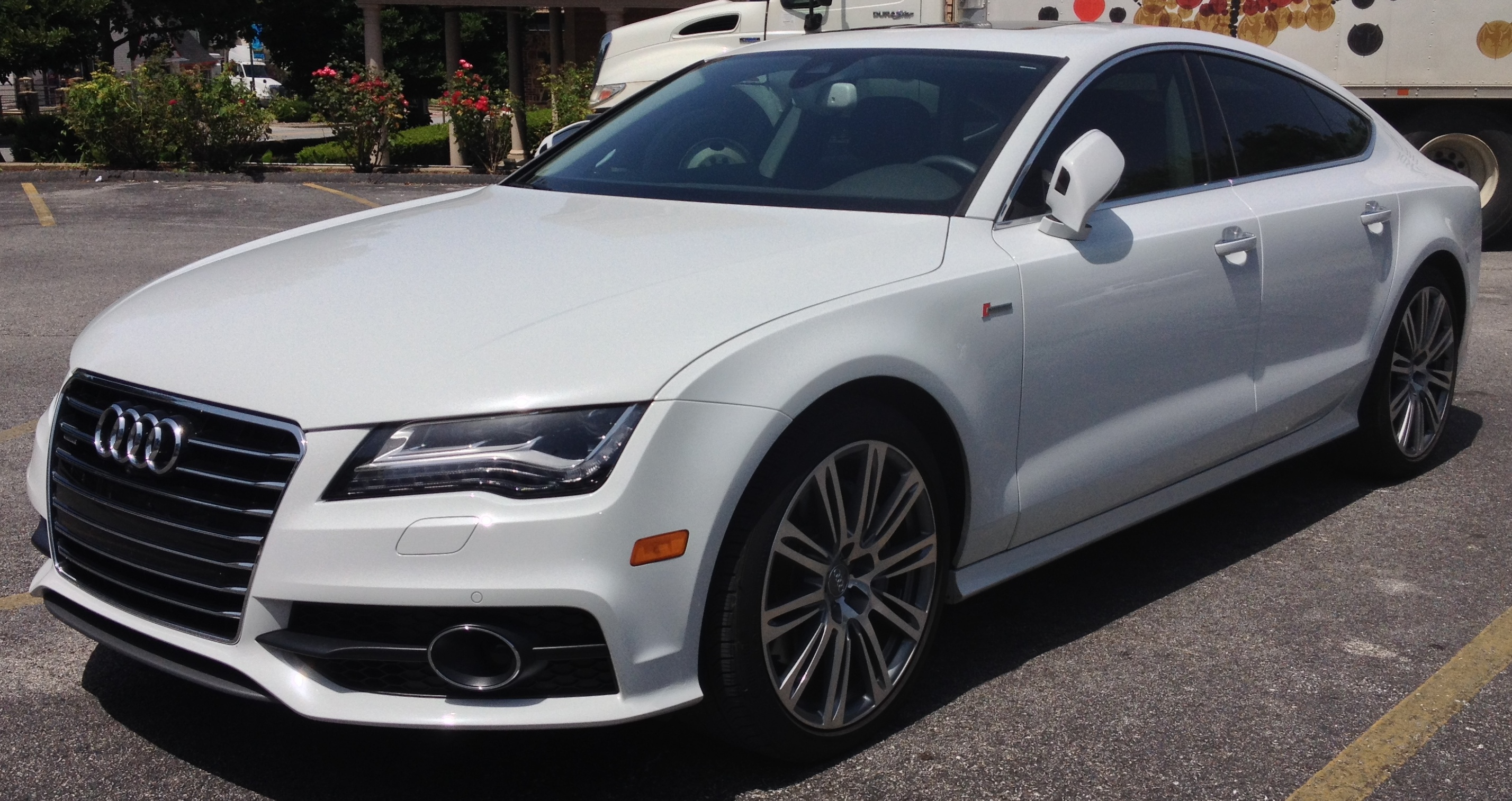 Fayetteville Arkansas, USA